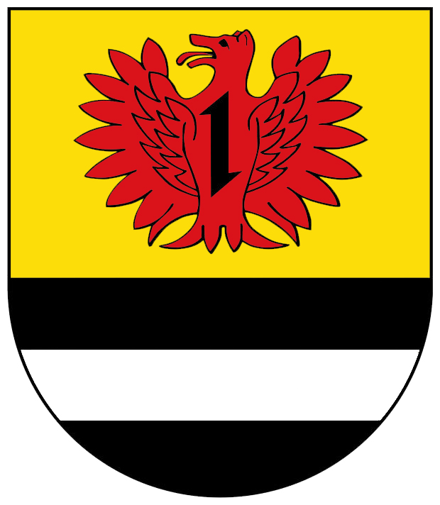 Wappen von Schwerbach